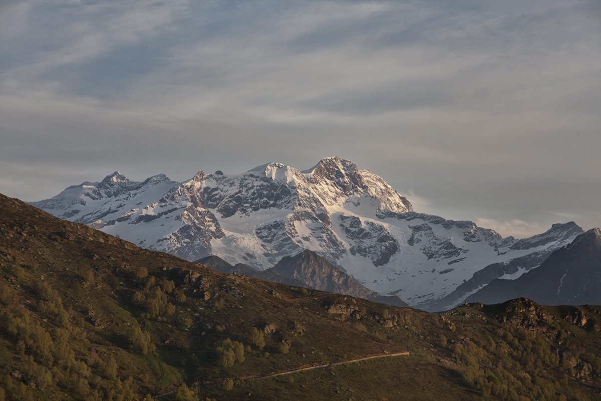 Parete Sud del Monte Roisa all'alba, dall'Alpe di Meggiana di Piode.